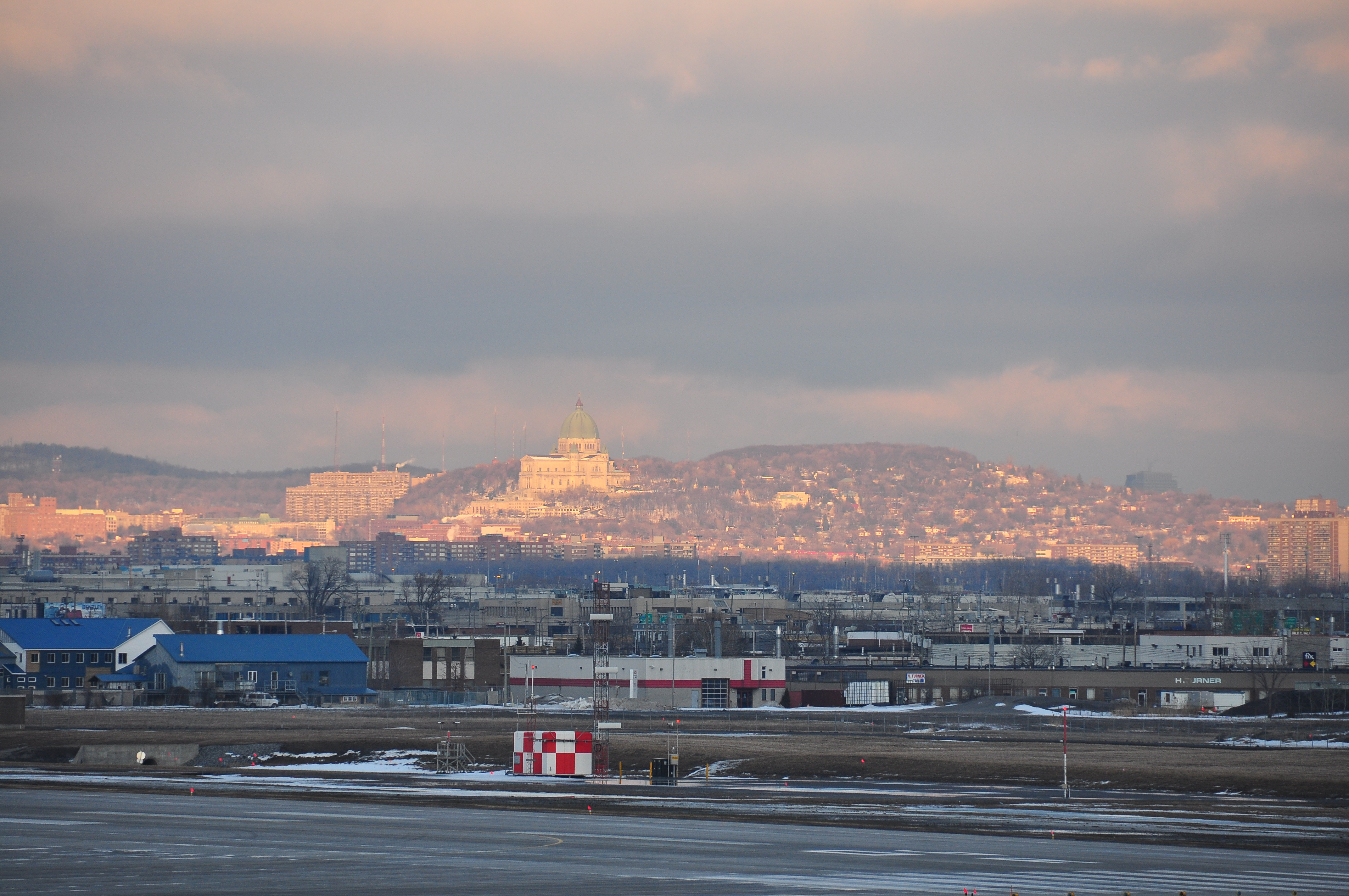 Oratoire St-Joseph et Westmount (Mont Royal)